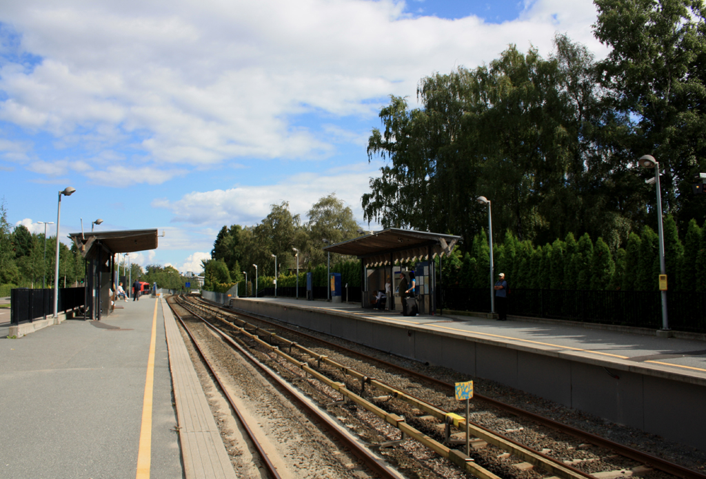 Borgen t-banestasjon. Sett fra plattformen mot Makrellbekken/Montebello i retning mot Majorstuen.